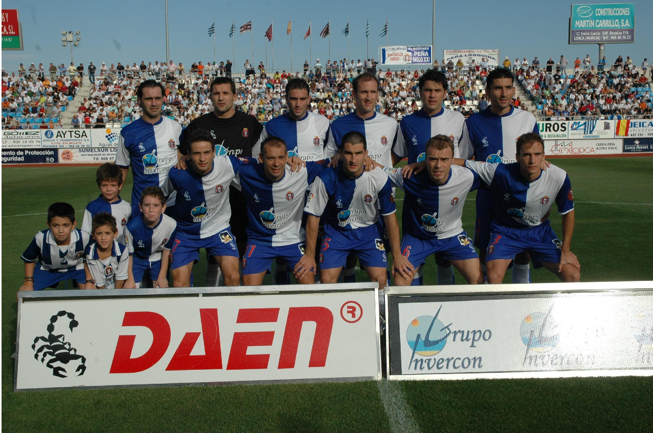 Los jugadores posan en un partido en casa